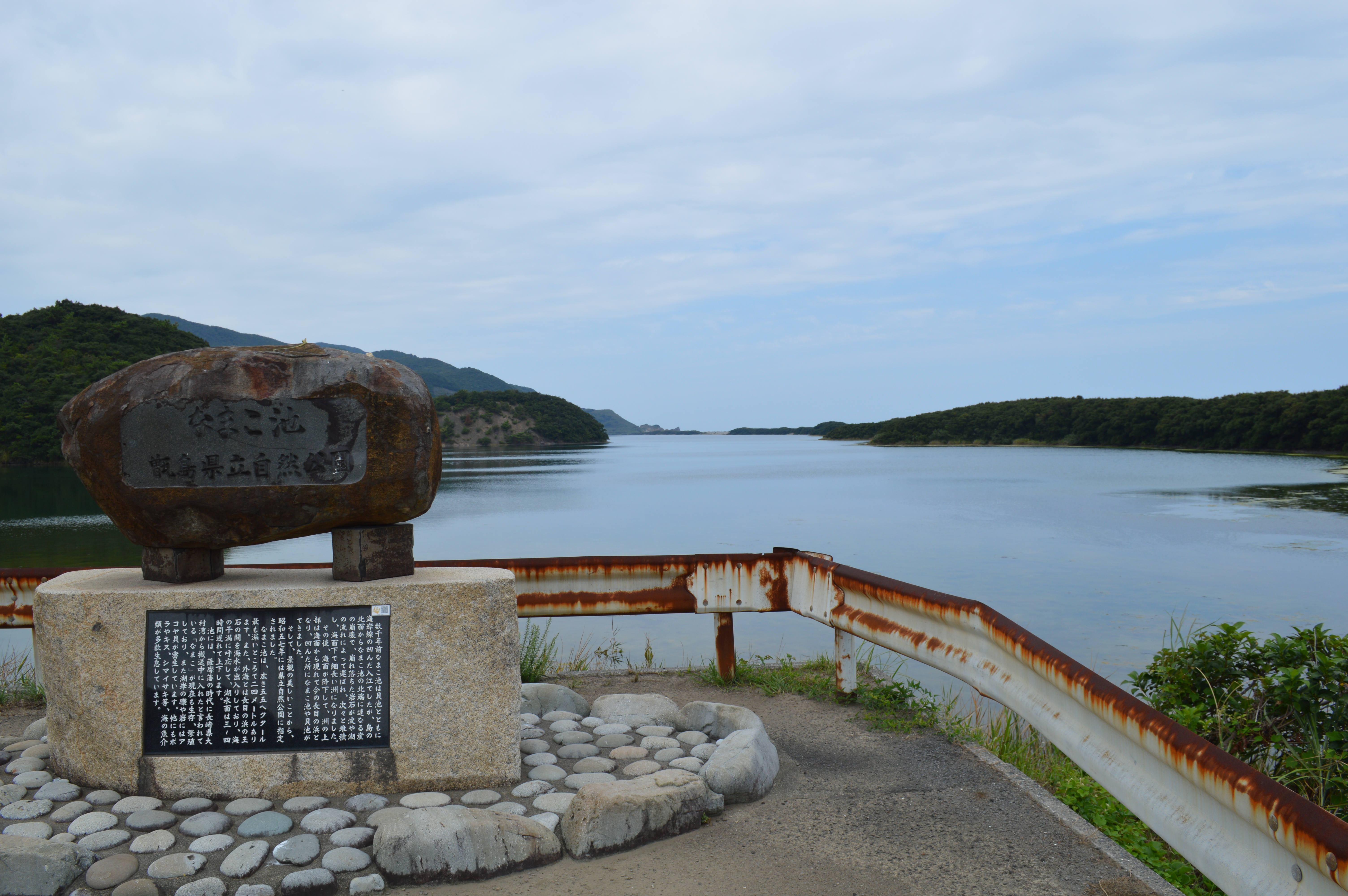 鹿児島県薩摩川内市の上甑島、なまこ池（海鼠池）